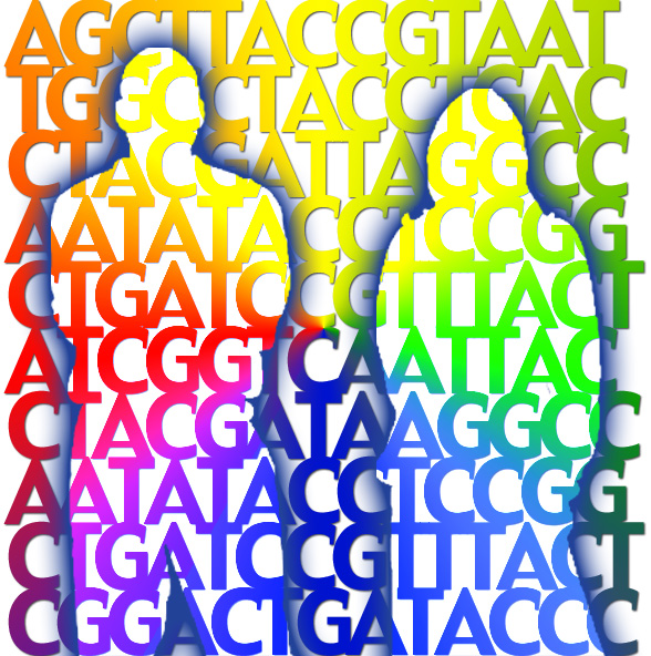 Nucleotides